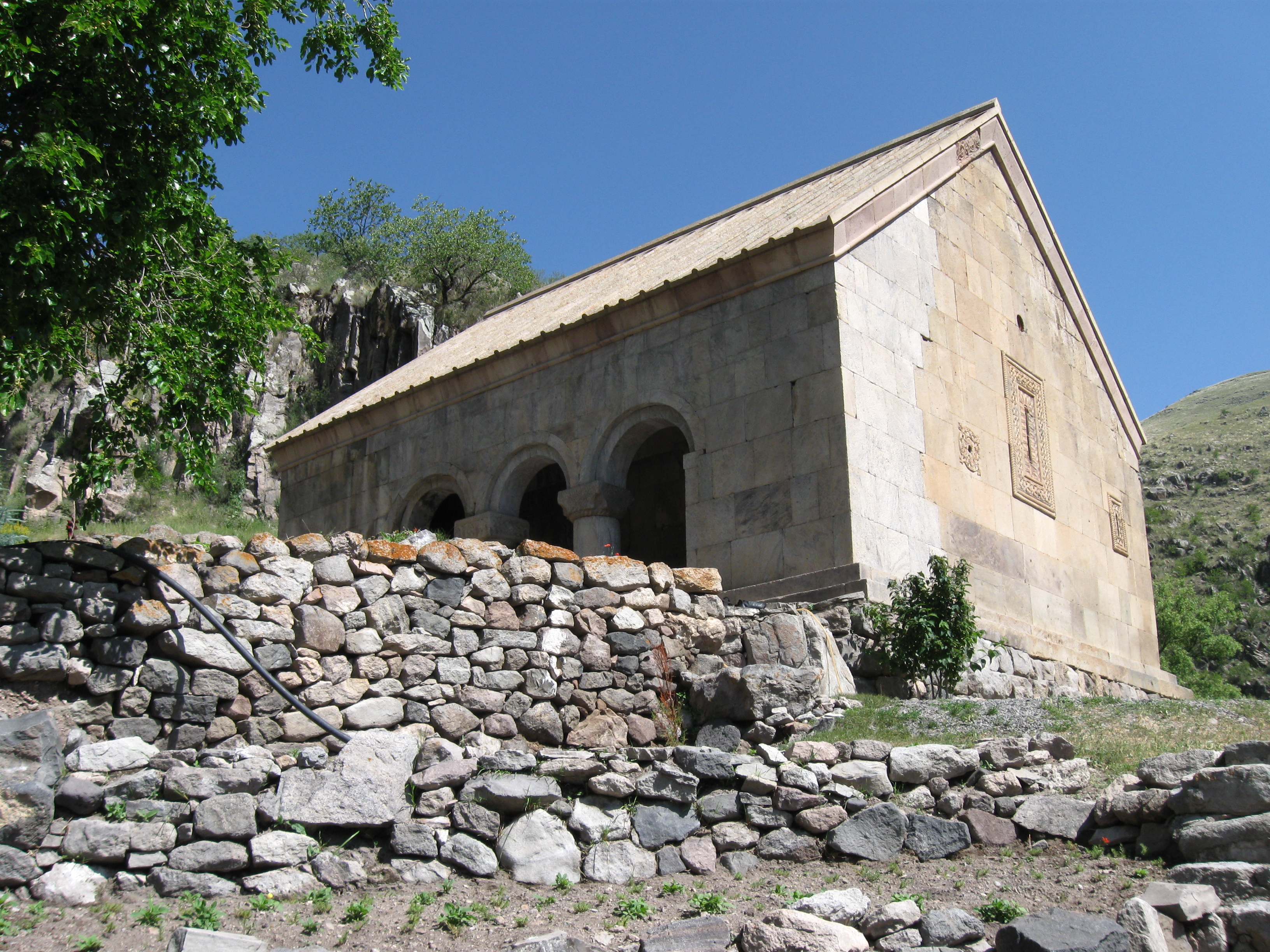 ვანის ქვაბები გამოქვაბული მონასტერი